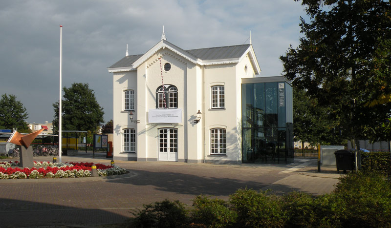 Stationsgebouw Reuver. Nu ingericht als restaurant De Vertraging.